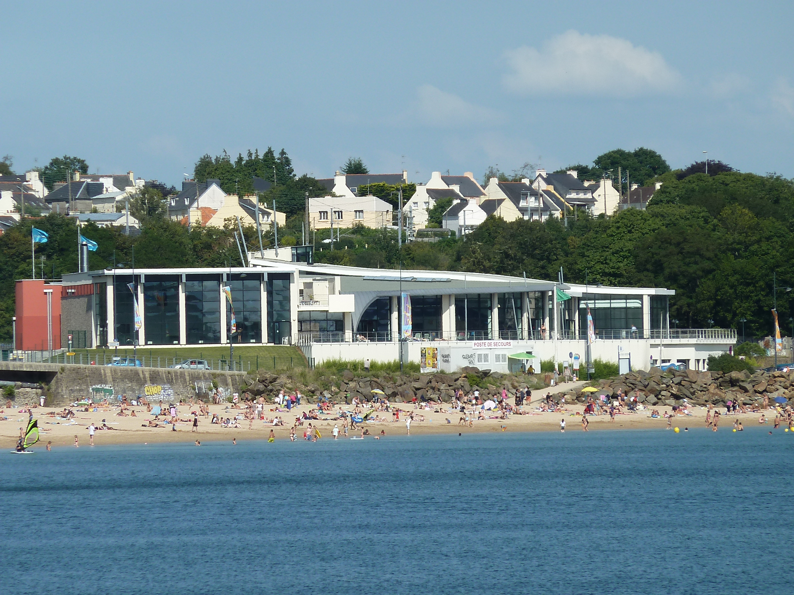 Piscine Spadium Park du Relecq-Kerhuon vu depuis le port de plaisance de Brest